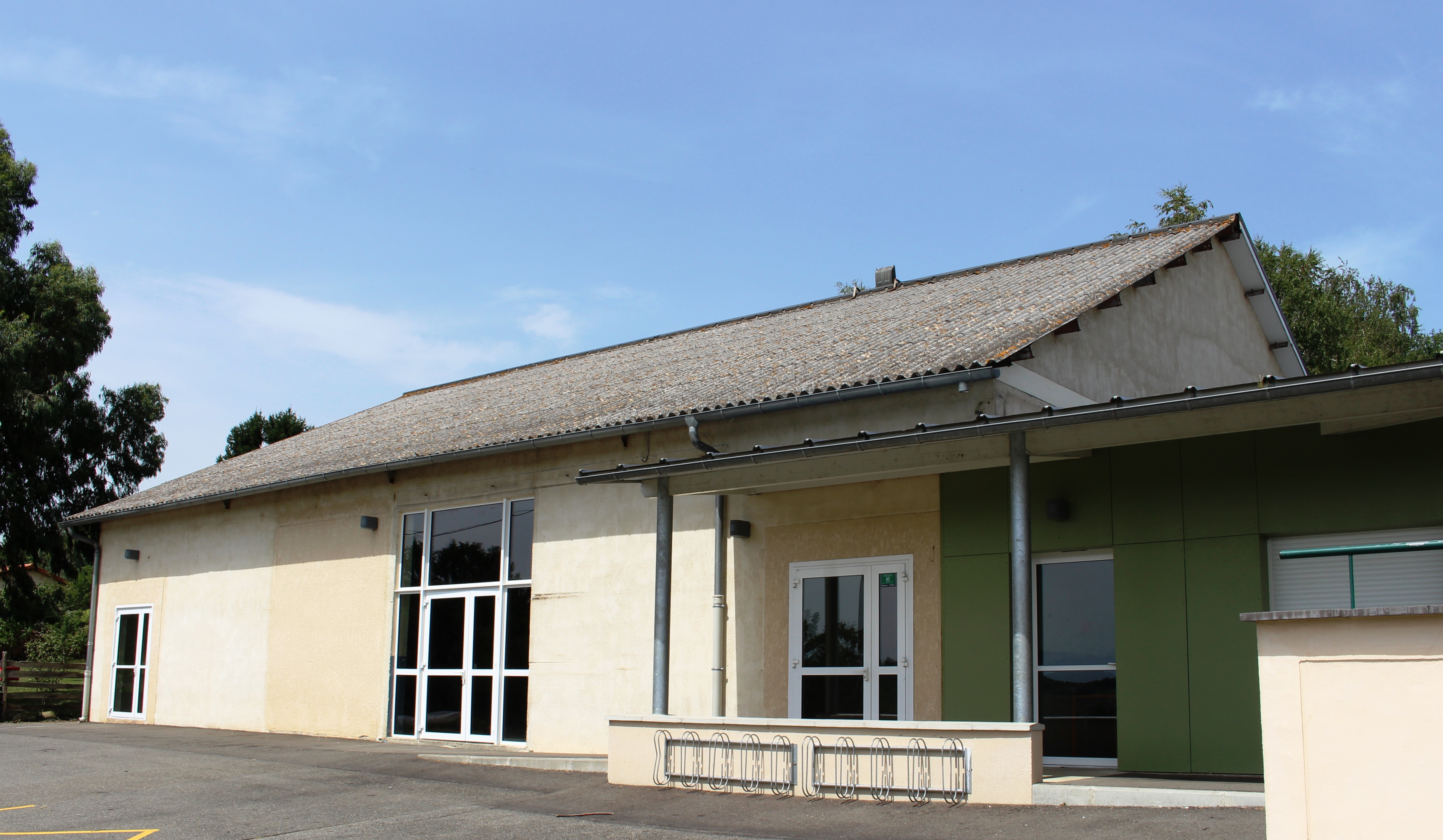 Salle des fêtes de Tarasteix (Hautes-Pyrénées)